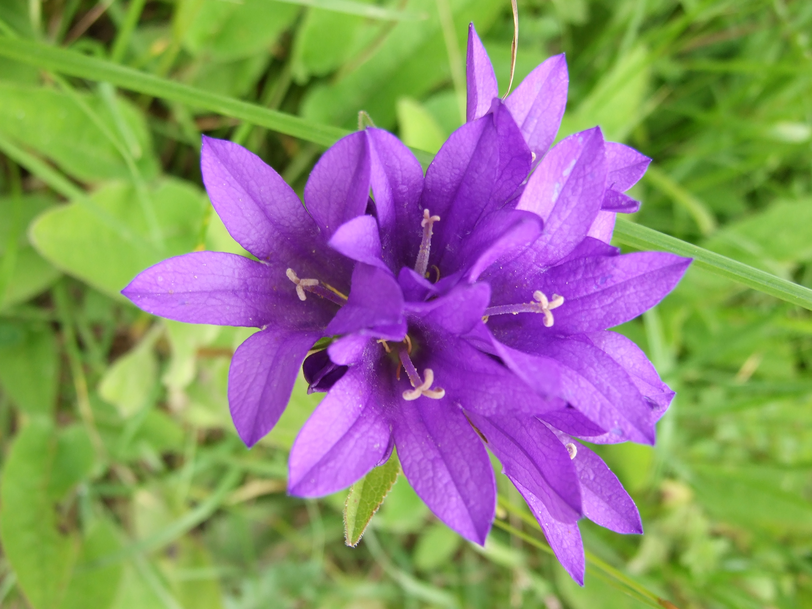 Zvonkynápověda